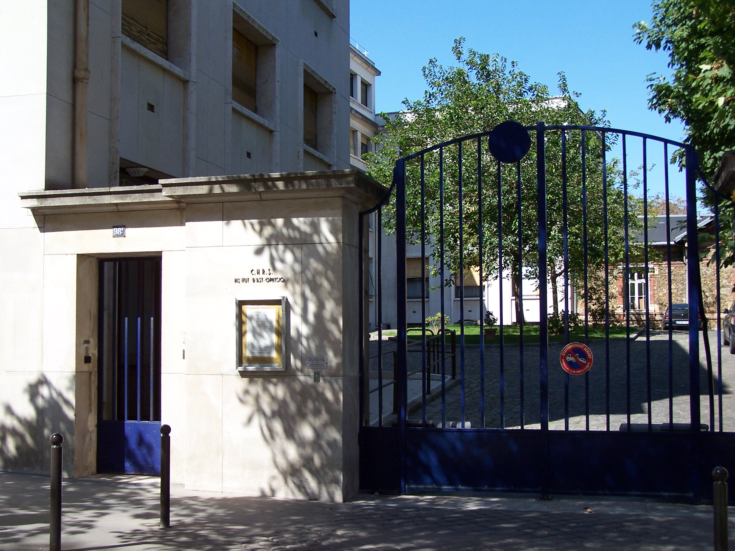 Entrée de l'Institut d'astrophysique de Paris, CNRS, 98 boulevard Arago, Paris